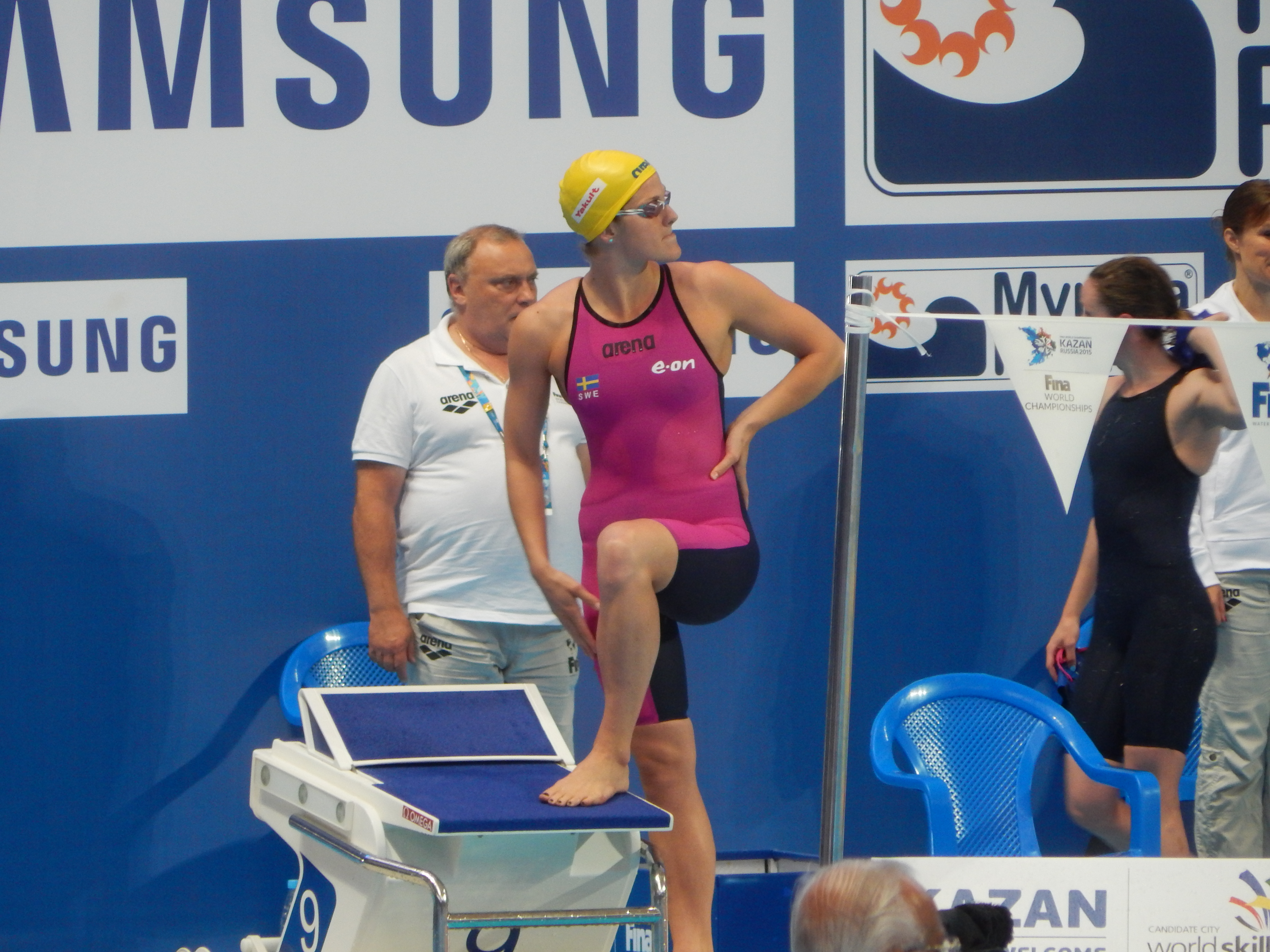 Стина Гарделл на чемпионате мира в Казани